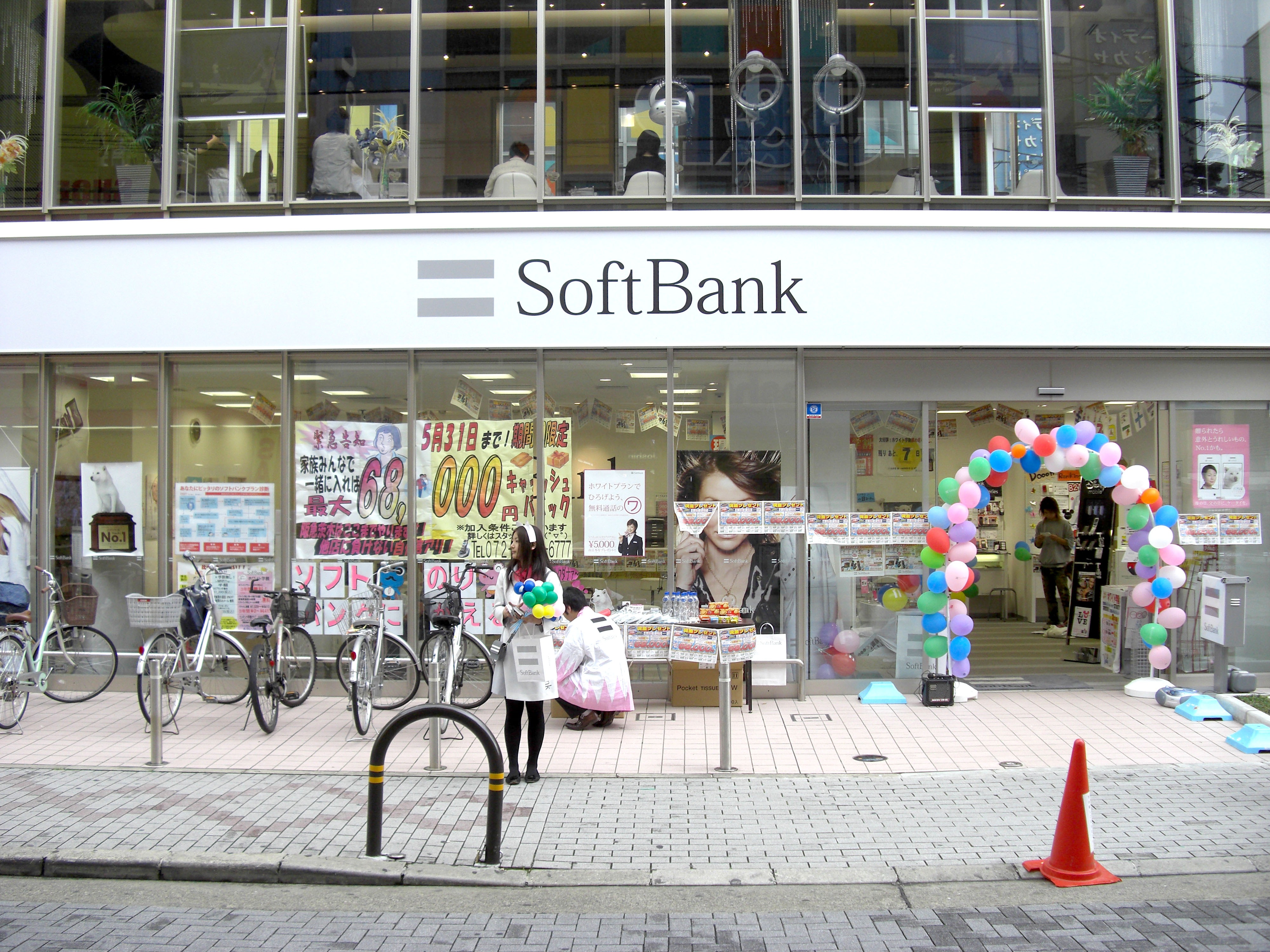 SoftBank Hankyu-Ibaraki,Futabacho Ibaraki-City Osaka Japan.